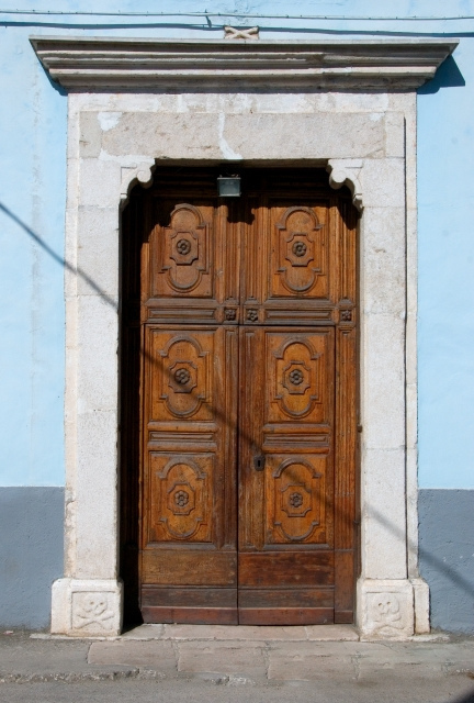 Wikipedia: Bojano.